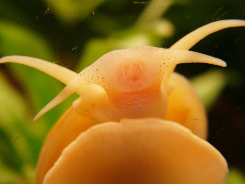 Wiederum aus meinem Ex-Aqua. Freigegeben von